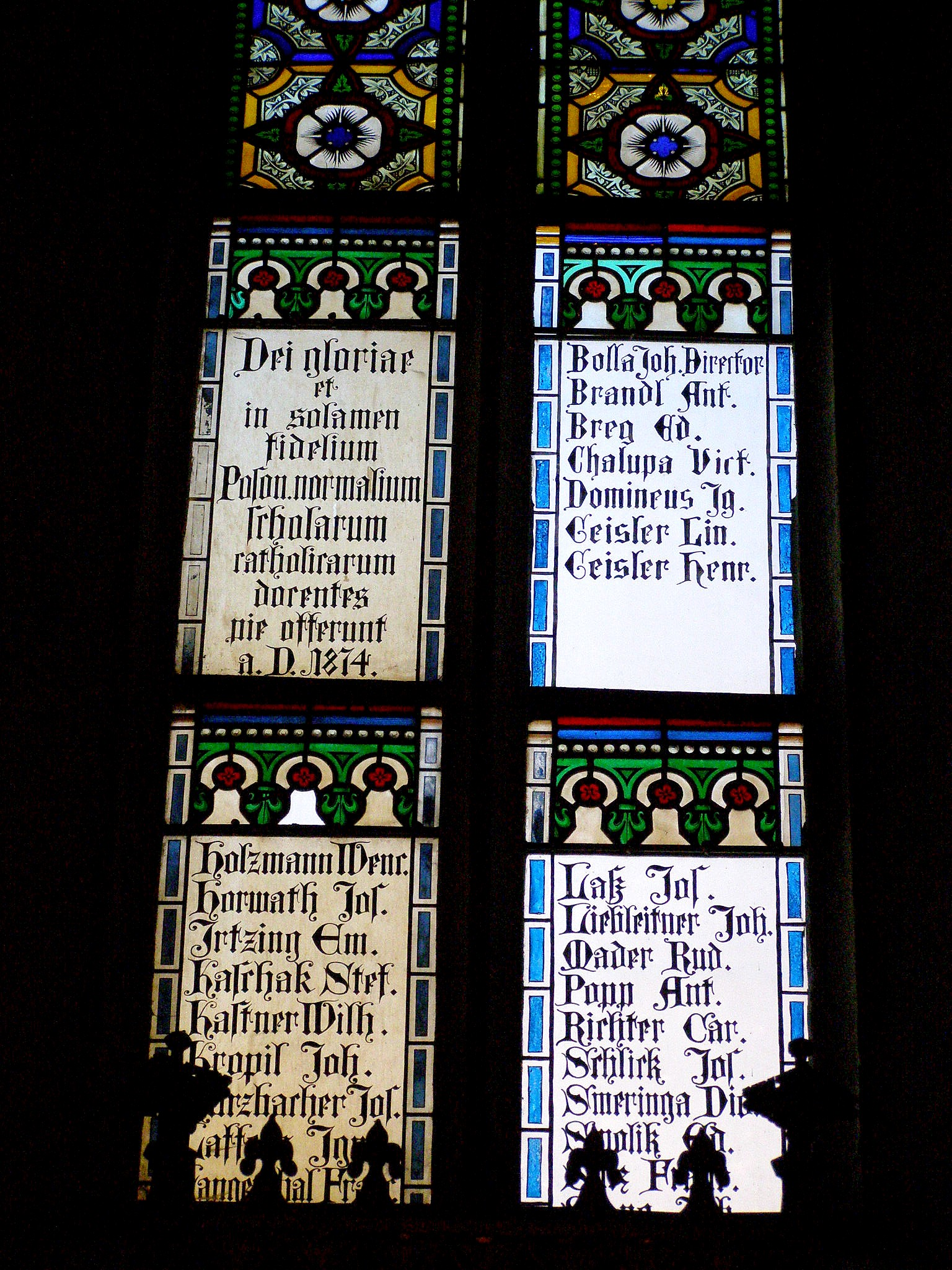 Zoznam donátorov na vitráži v ľavej lodi, ktorými boli učitelia školy, tzv. normálky